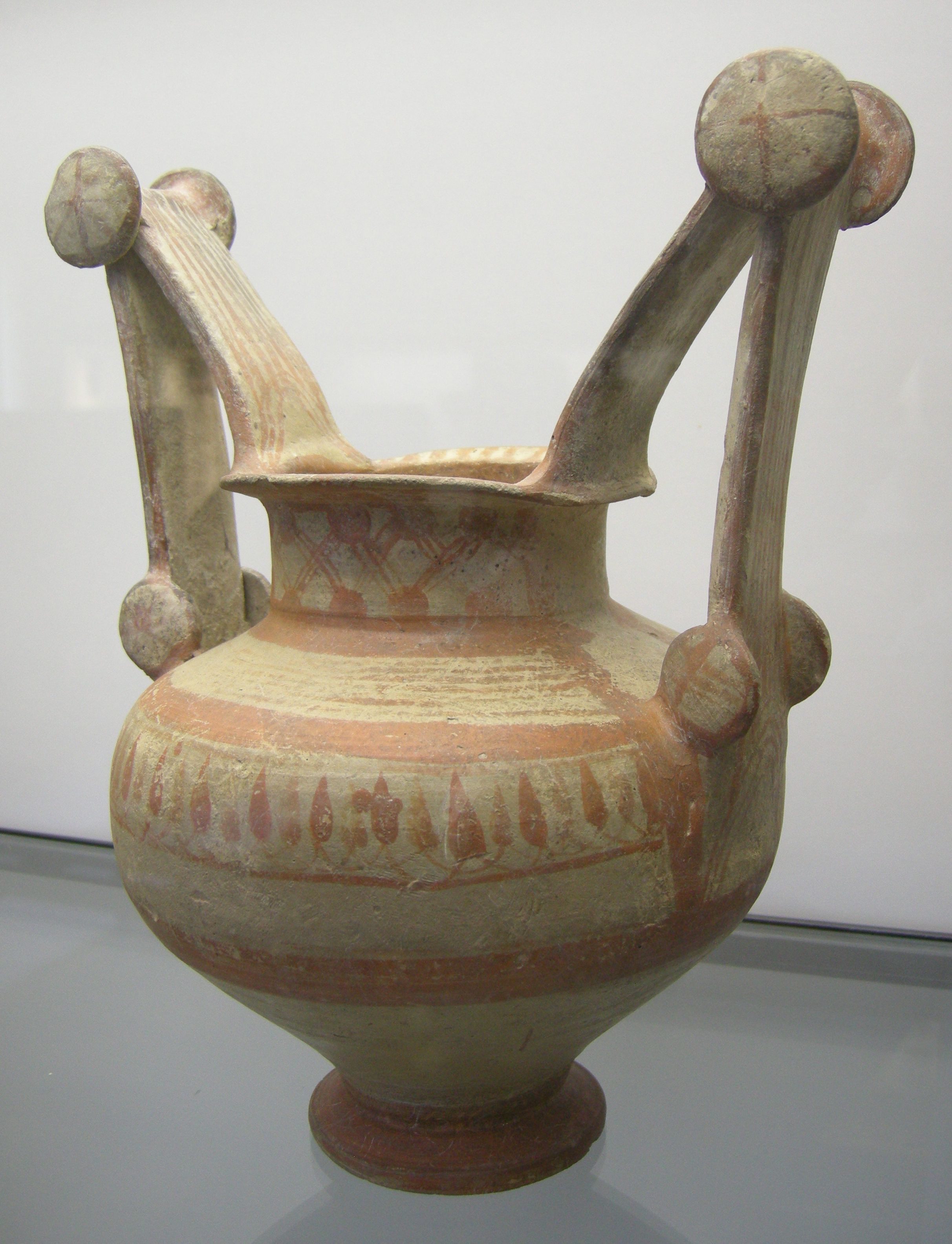 Messapian trozella (1)